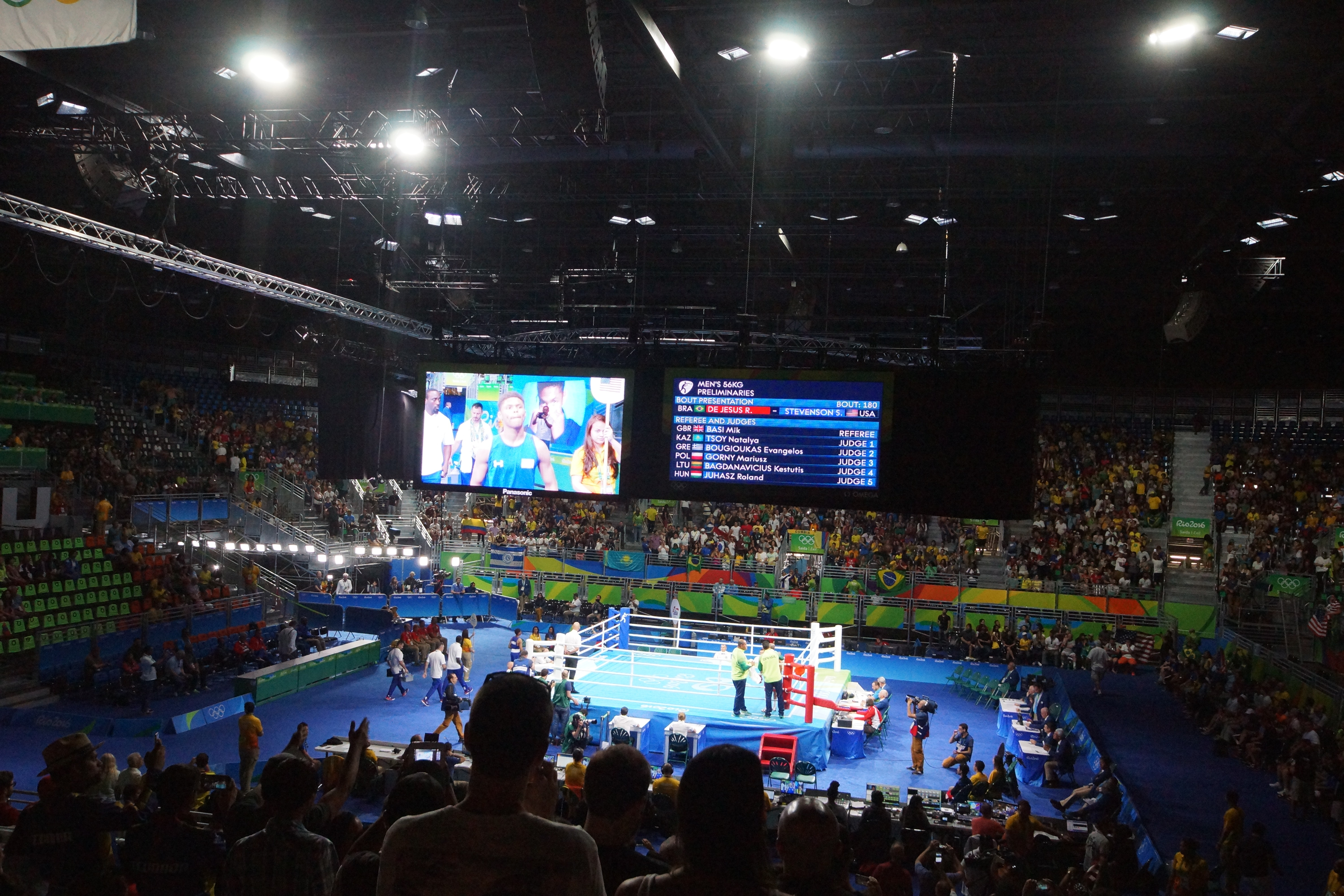 slt.a-77